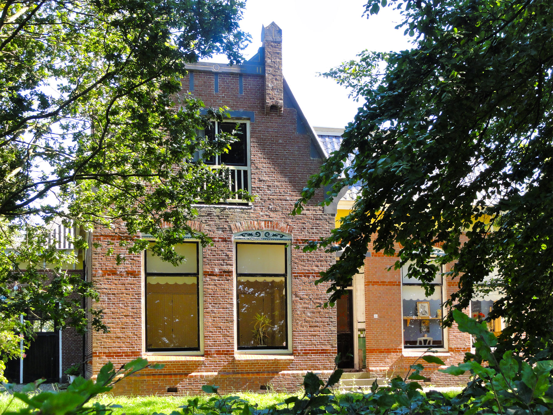 Boerderij aan de Grote Hornstweg 16 It Heechsan